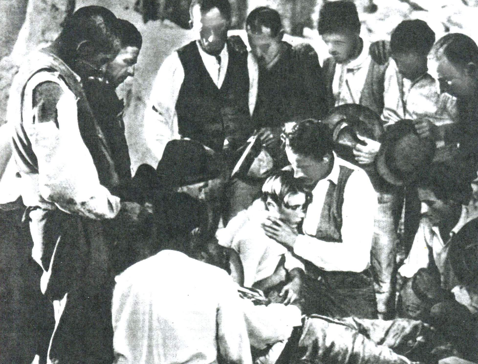 Una scena de "La fossa degli angeli" (Bragaglia, 1937)